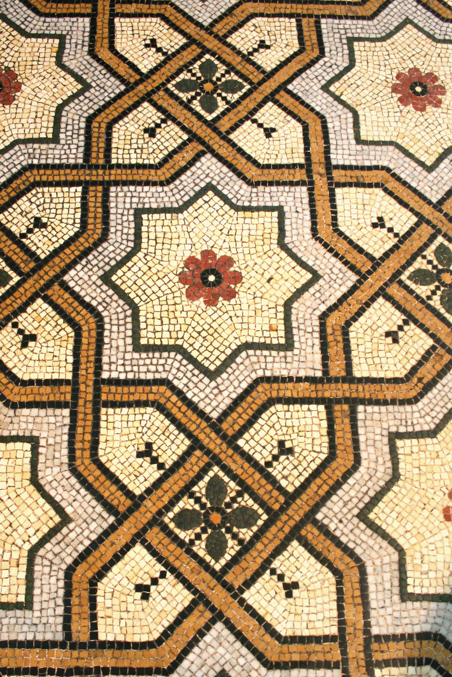 Mosaïque du sol dans la nef de la Basilique de Notre-Dame de la Garde à Marseille